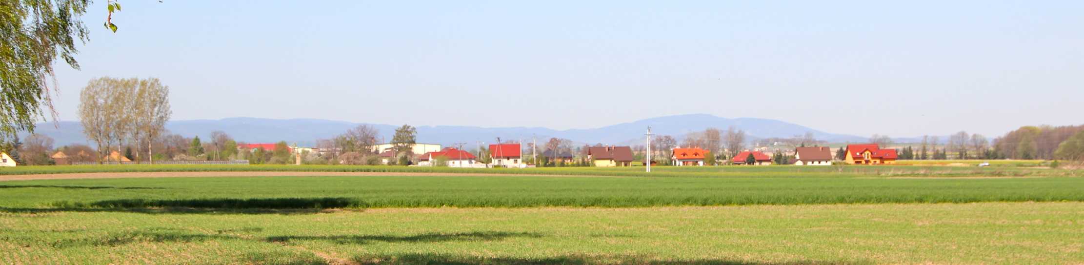 Gołuszowice - wieś w Polsce położona w województwie opolskim, w powiecie głubczyckim, w gminie Głubczyce.